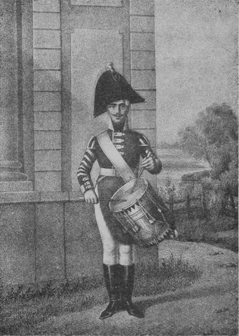 Данное изображение было использовано в статье «Белевский, 71-й пехотный, полк» опубликованной в пятом томе «Военной энциклопедии», который был издан книгоиздательским товариществом Ивана Дмитриевича Сытина в 1911 году в столице Российской империи городе Санкт-Петербурге. Изначально — иллюстрация №1350 в 10 томе Исторического описания одежды и вооружения российских войск.